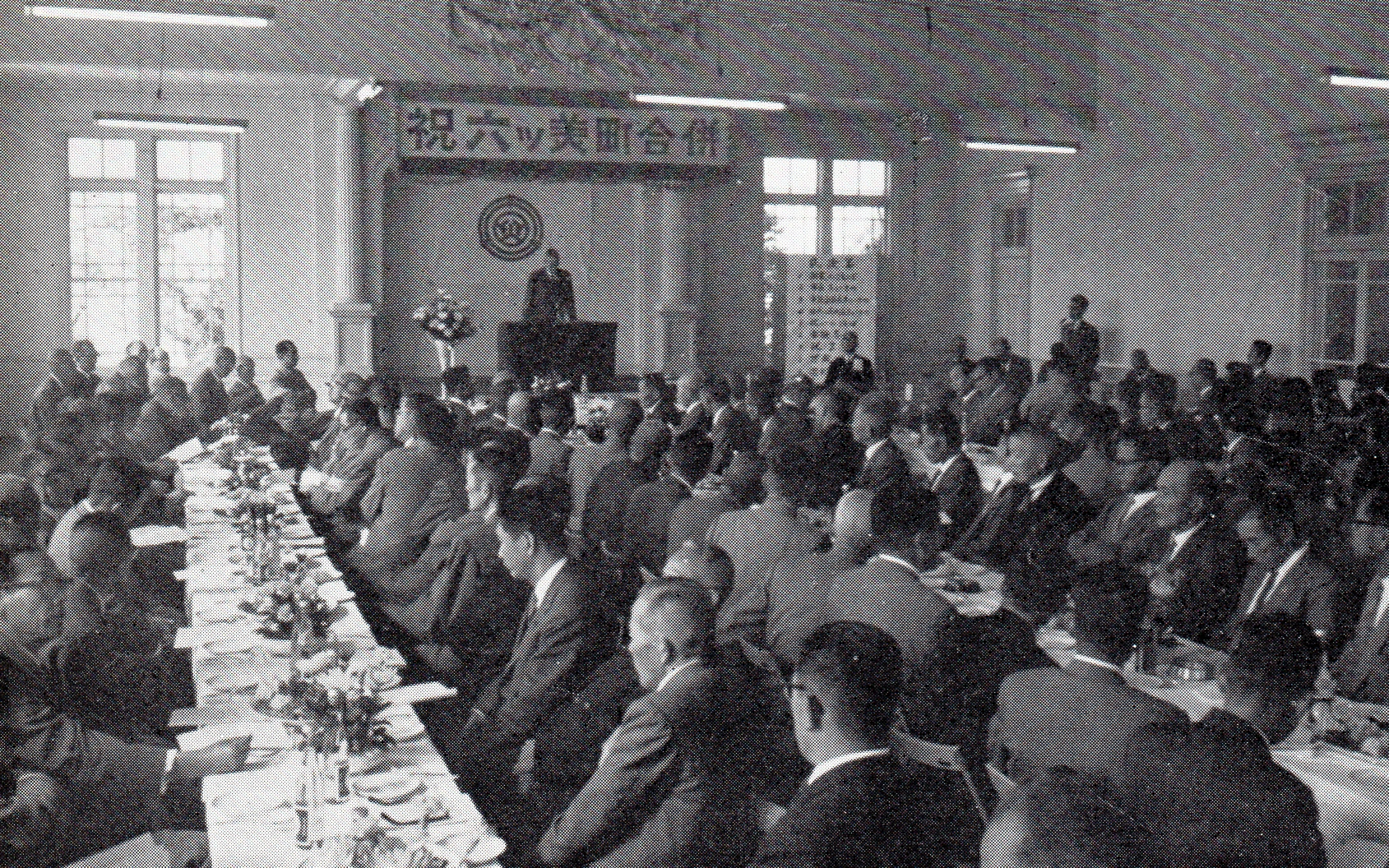 岡崎市は碧海郡六ツ美町を編入（1962年10月15日）。